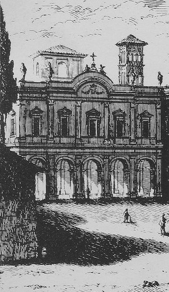 Chiesa di Sant'Eusebio all'Esquilino, incisione (1753)